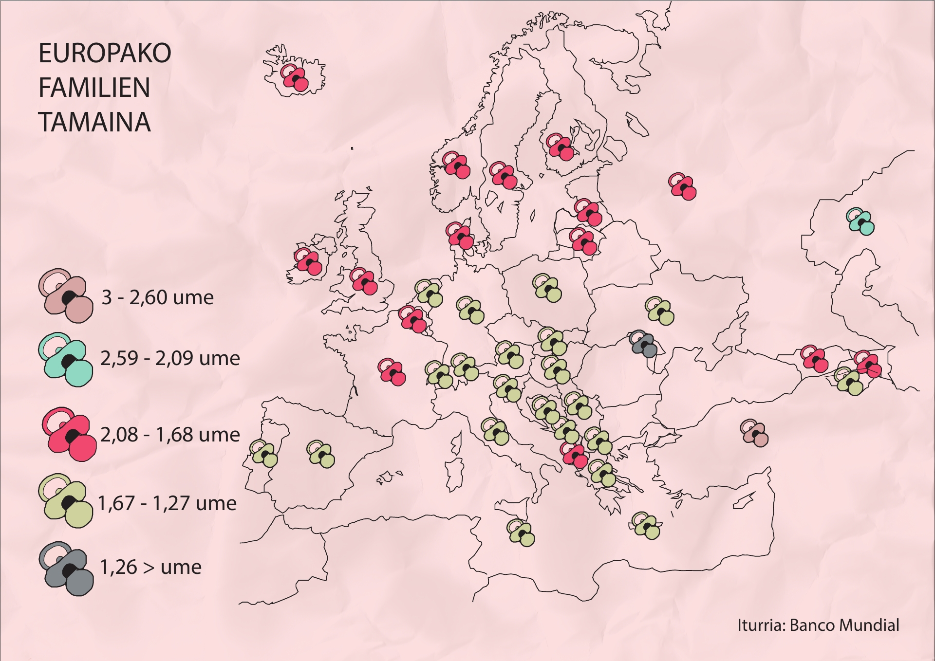 Europako bataz besteko familien tamaina.